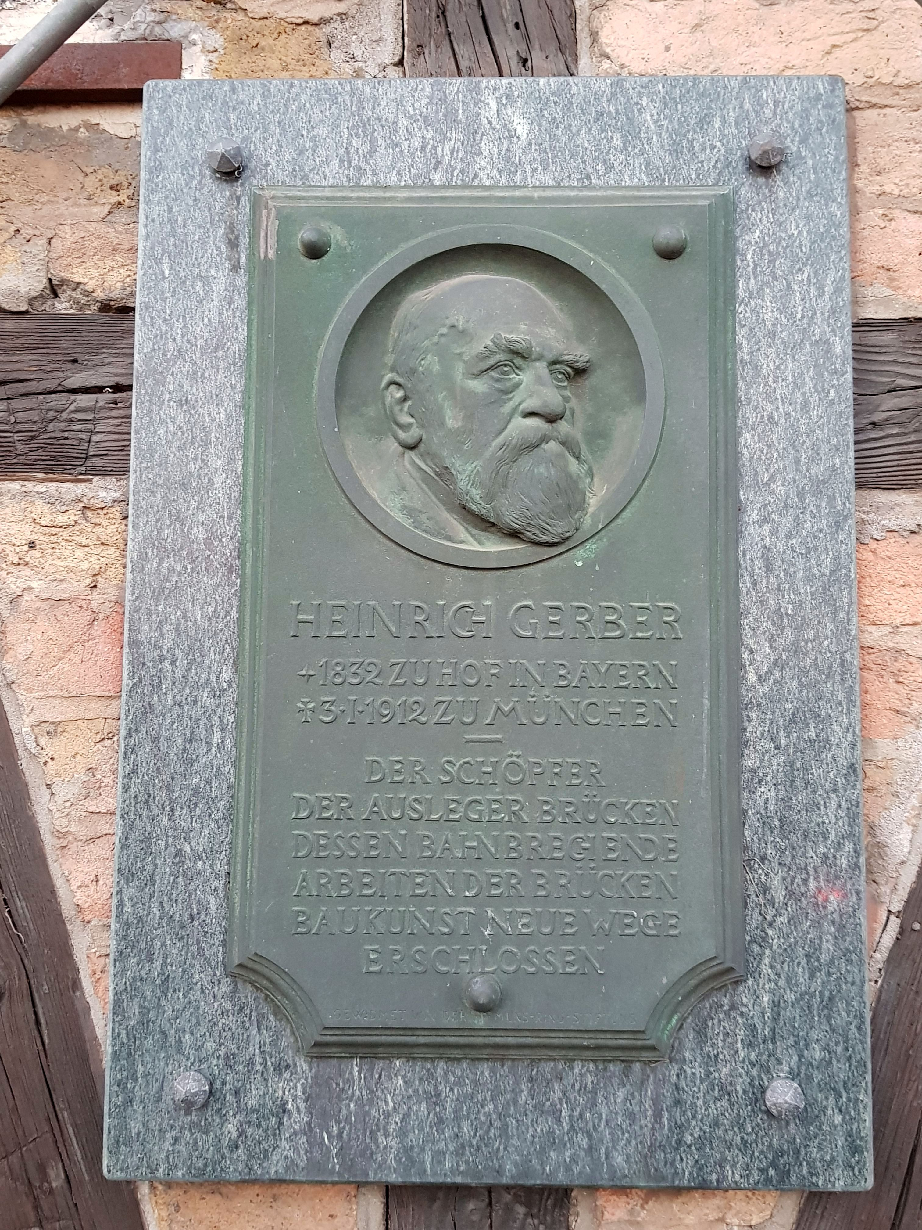 Gedenktafel am Gerberhaus